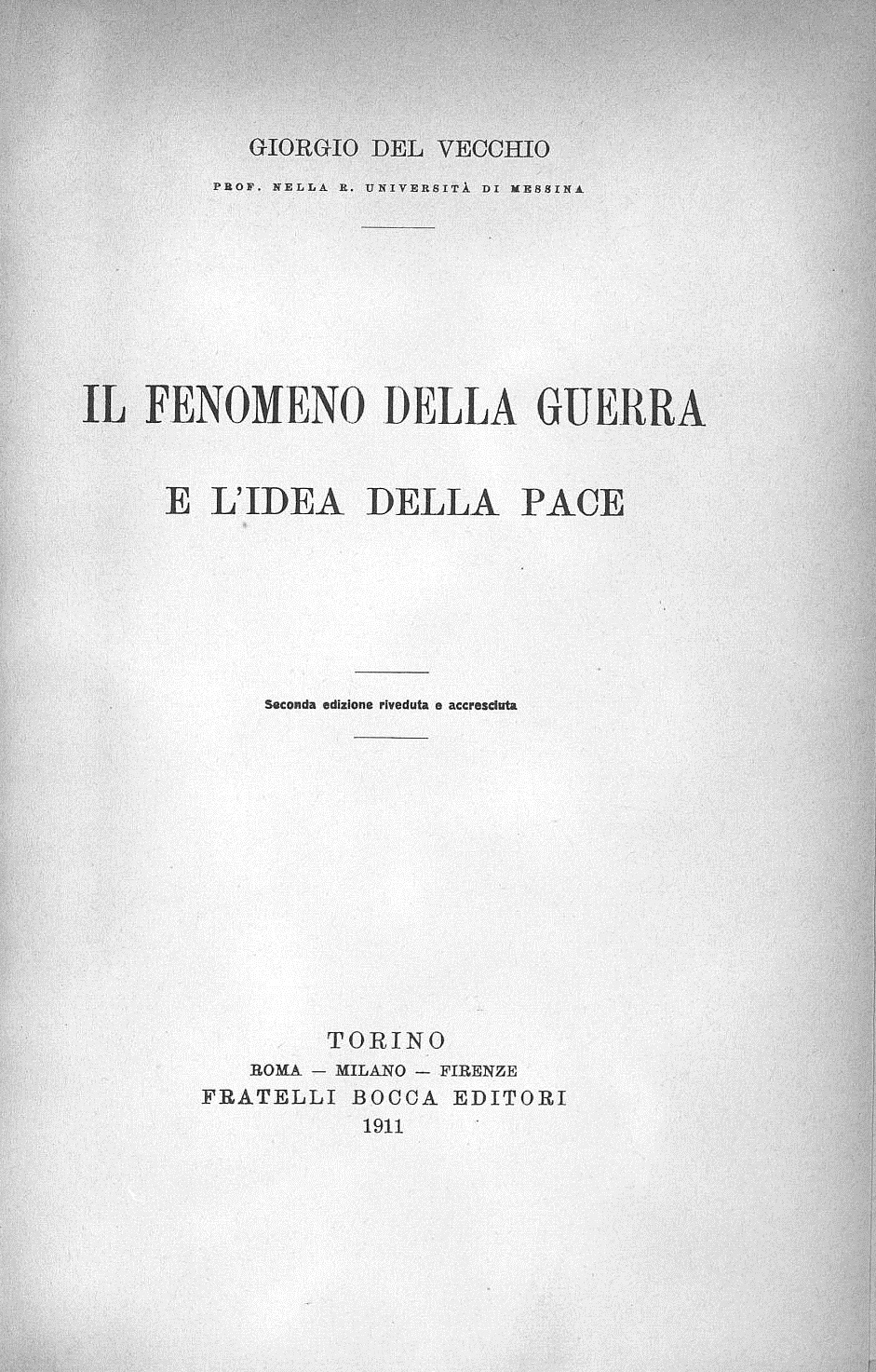 Frontespizio